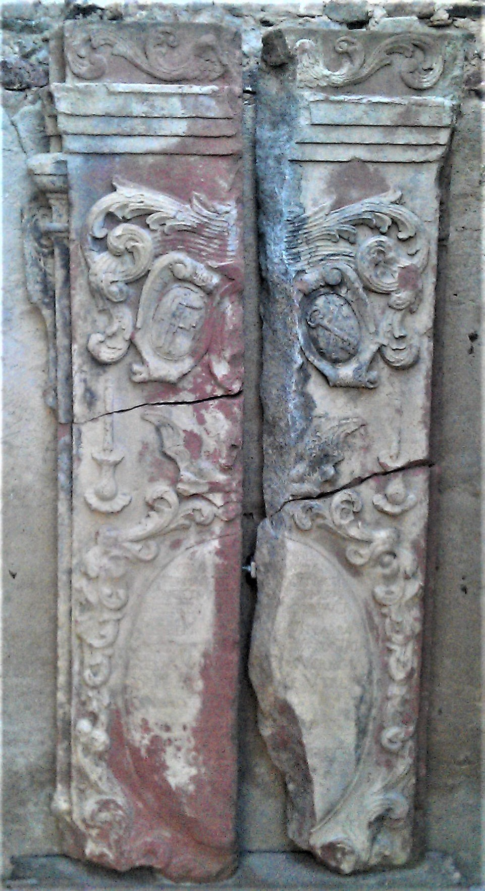 Grabplatte aus St. Martin (Lorch) 1819 geteilt und zu Treppenstufen um gearbeitet. 2017 bei der Instandsetzung der Sohlernsgasse gefunden und sichergestellt. Heute im Hof des Hilchenhauses aufgestellt.